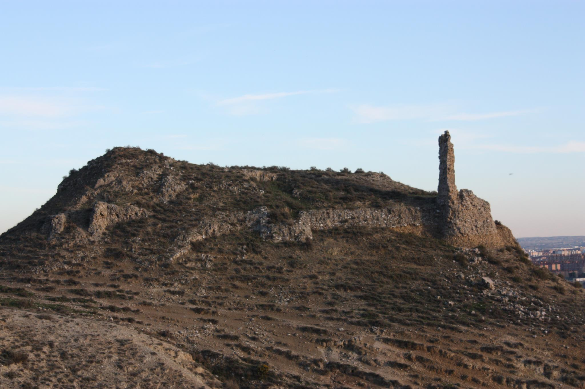 Restos del castillo de Juslibol, fortaleza que data del siglo XII que tuvo una enorme importancia en la toma de Zaragoza por parte de Alfonso I en 1118.